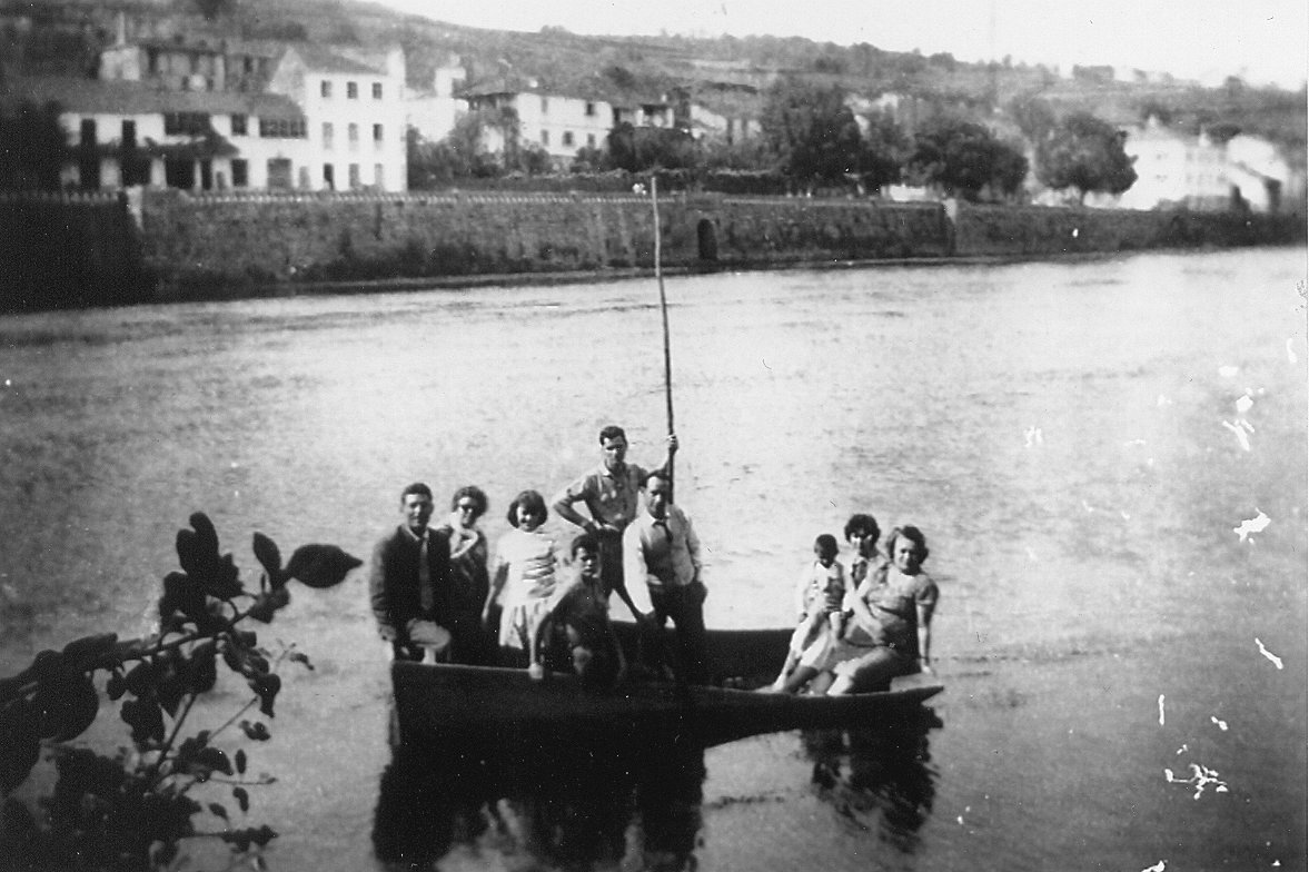 Pendente de descrición.